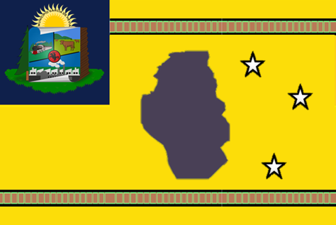 Bandera del Municipio García de Hevia la fria